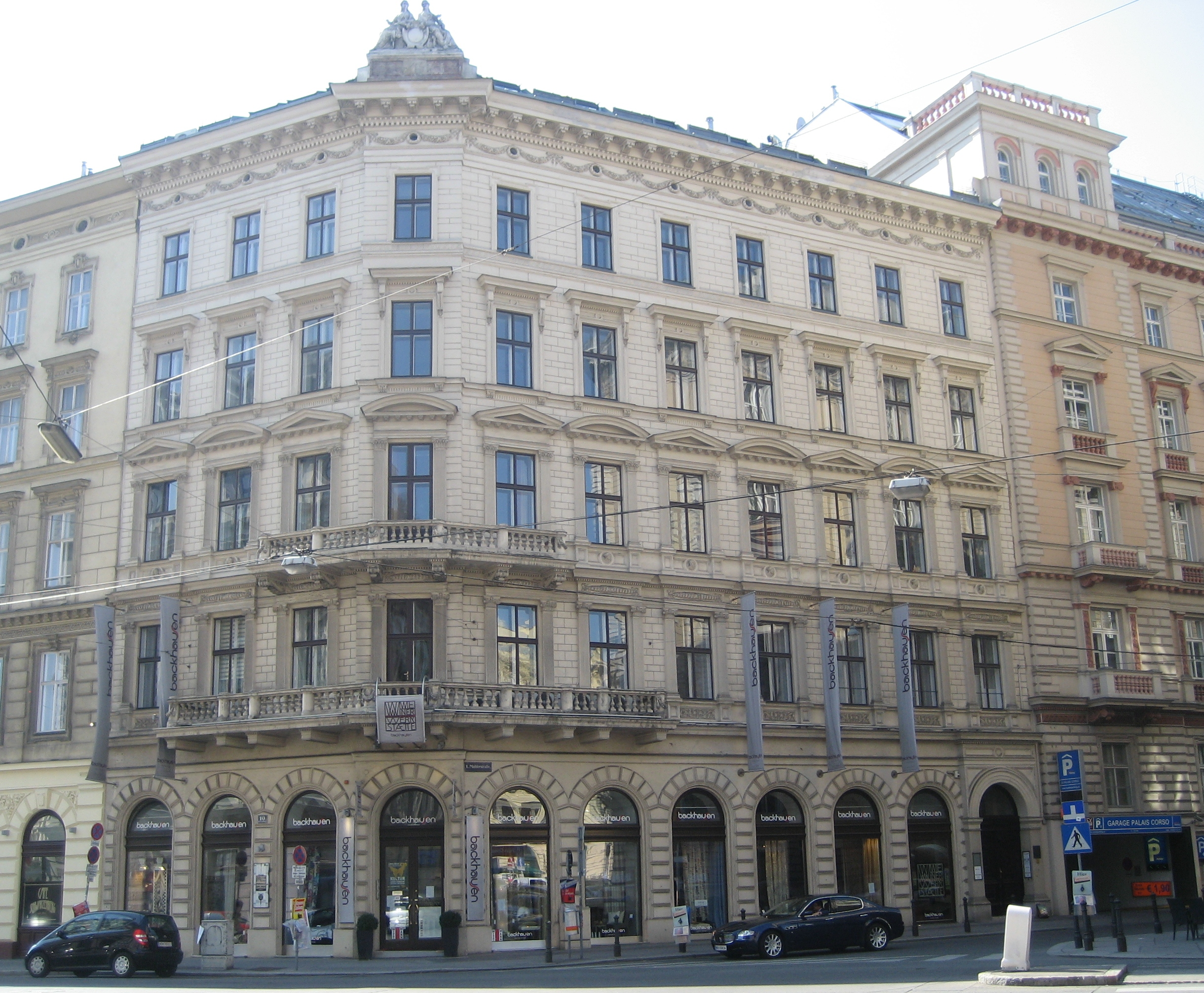 das Haus Mahlerstraße 14 im 1. Bezirk, in Wien